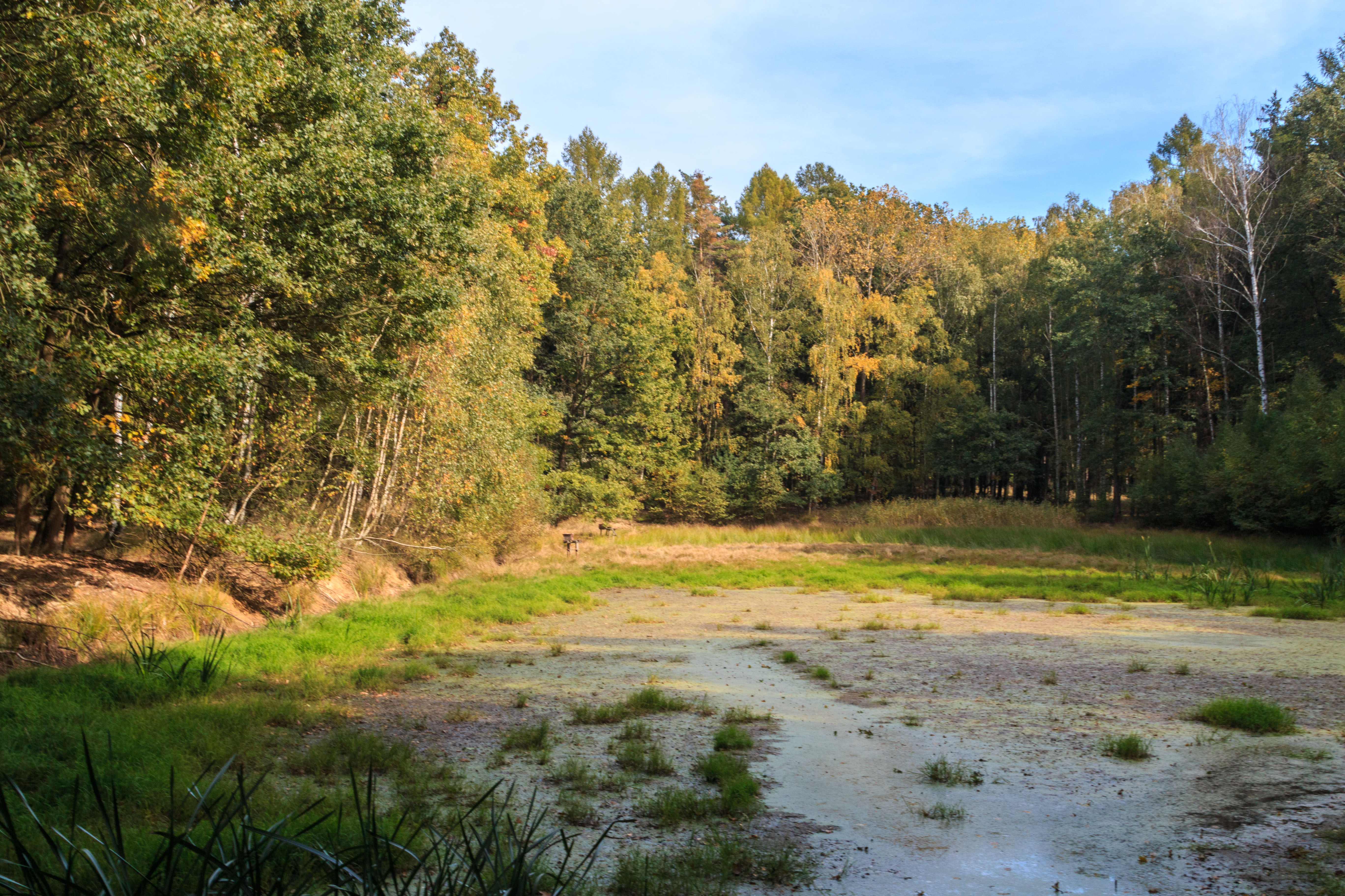 Lesní rybníček na Hrádkovském Project: Vodstvo.